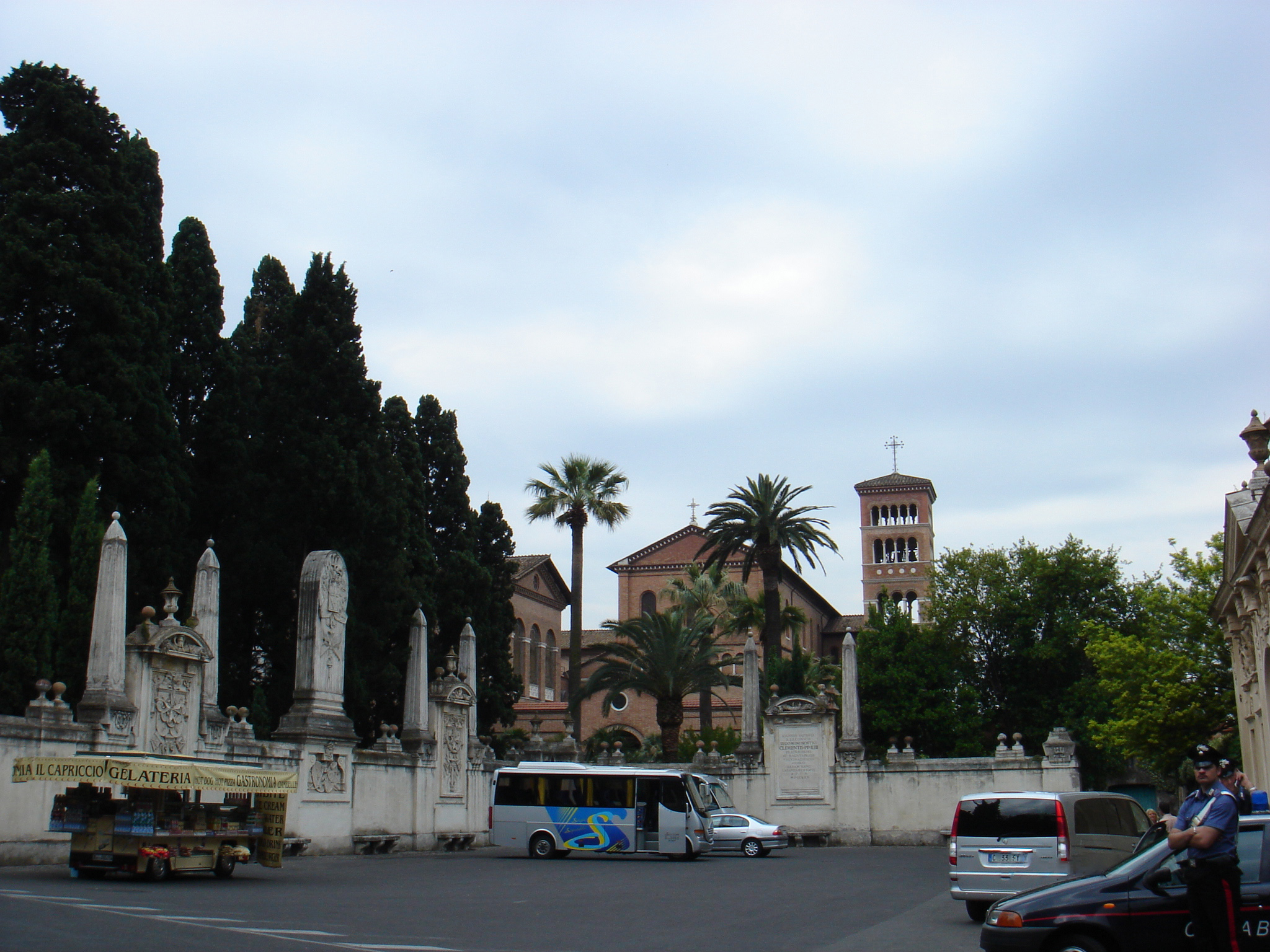 Roma, Aventino: piazza dei Cavalieri di Malta.